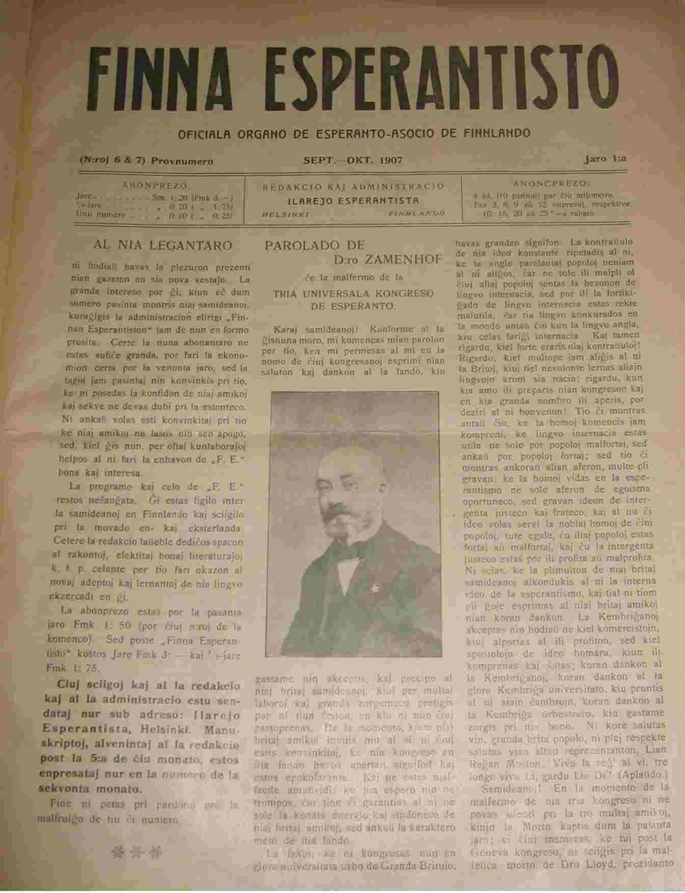 Priskribo Gazeto Finna esperantisto